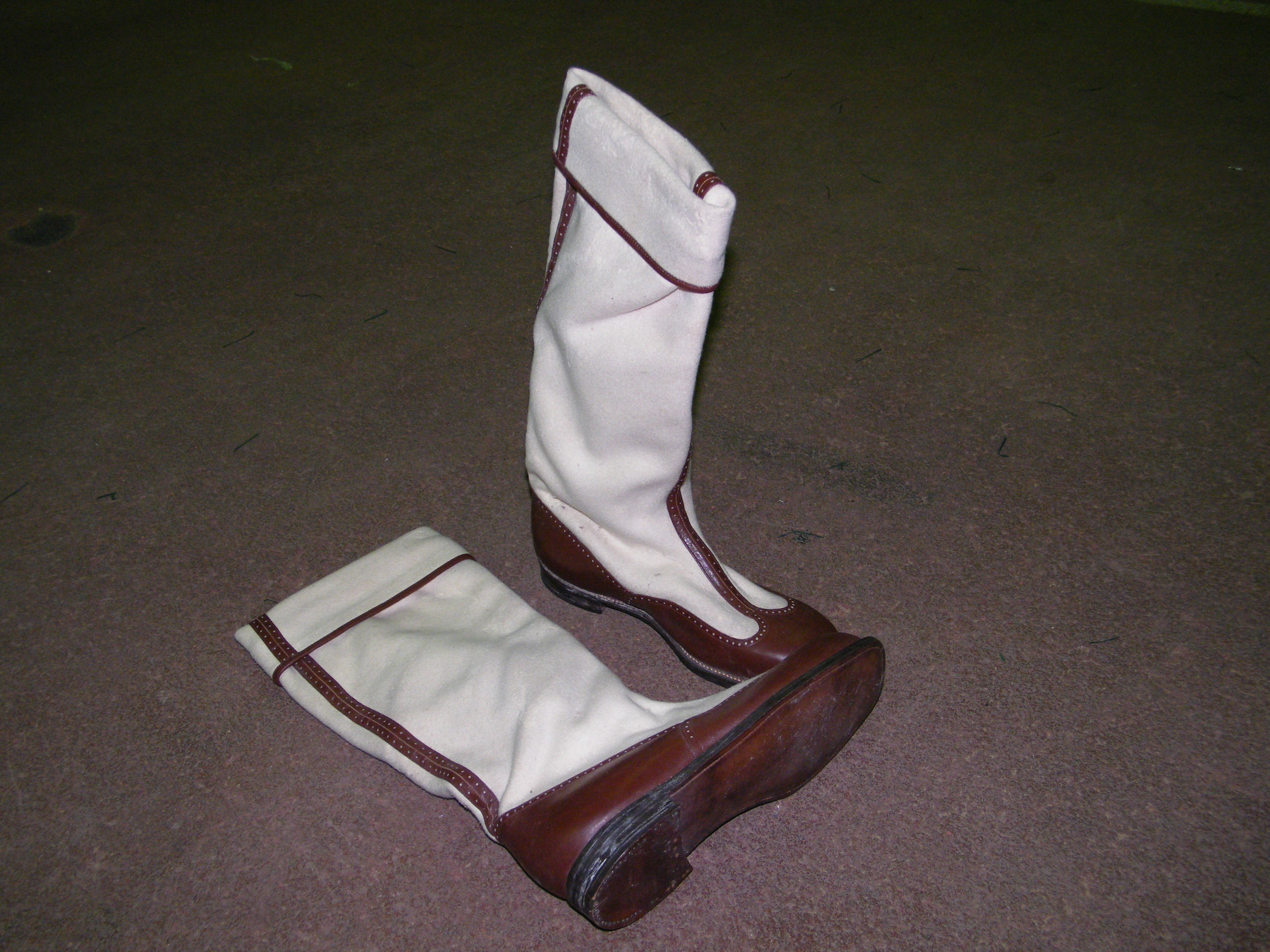 Бурки русская зимняя обувь, 1960-е годы